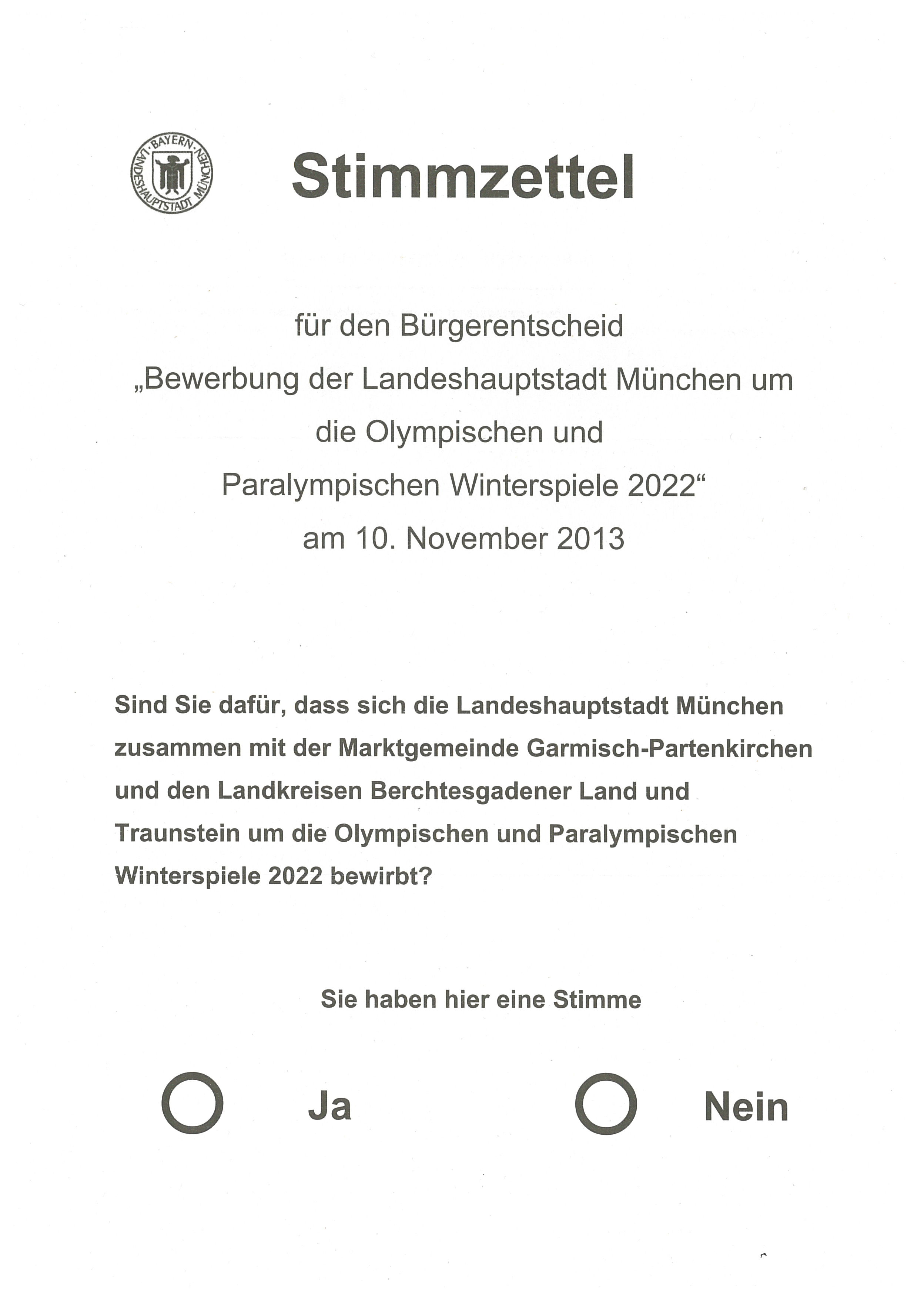 Stimmzettel zum Bürgerentscheid am 10. November 2013 über die Bewerbung um die Olympischen Winterspiele 2022 in München, Bayern.